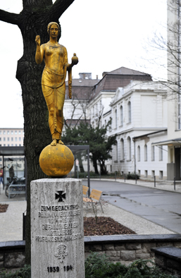 Schulz Otto: Gefallenendenkmal (Eisenguss, 1930), Barbara-Figur im ehemaligen Heereswaffenamt zum Gedenken an die Gefallenen der Artillerie-Prüfungskommission